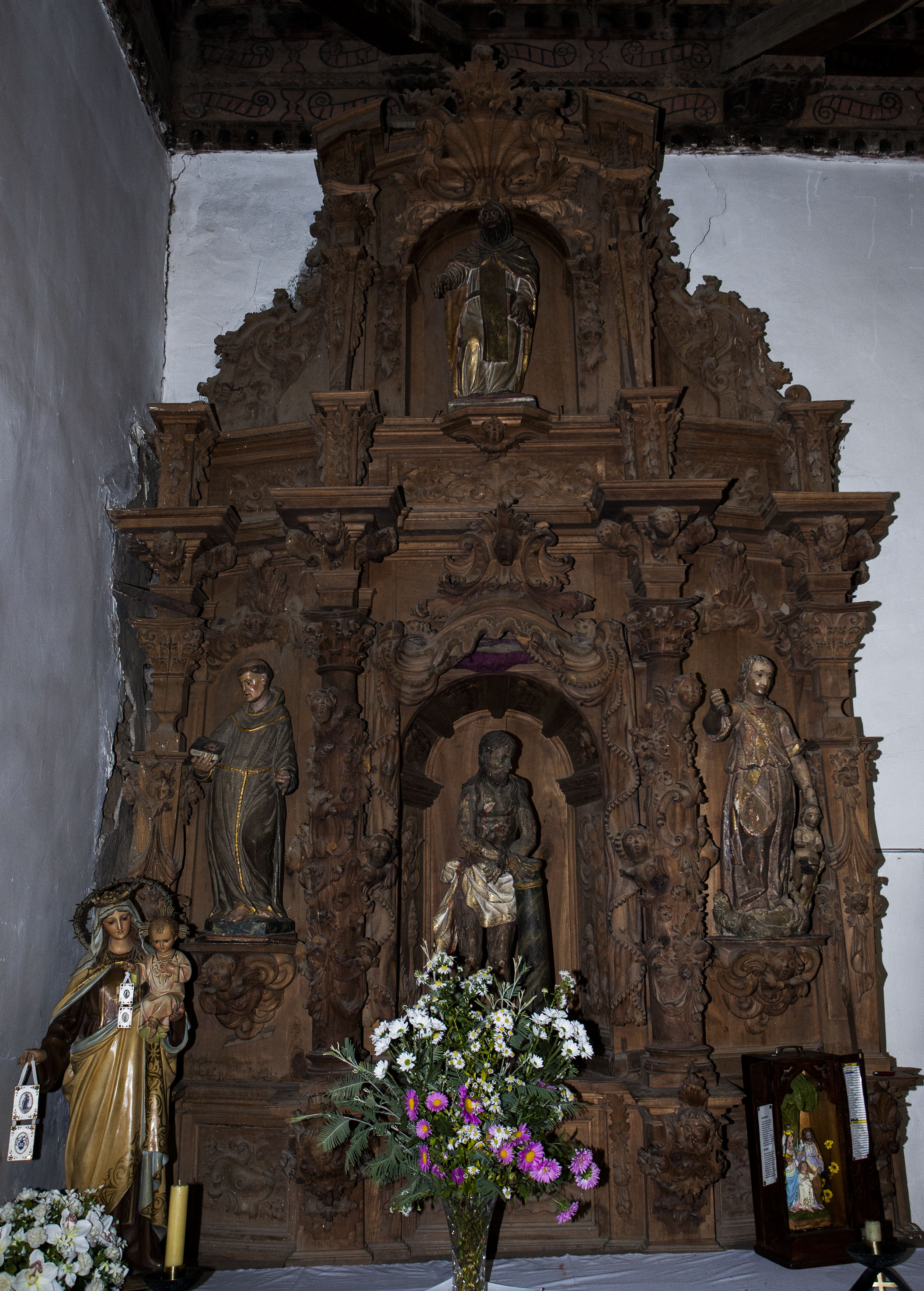 Retablo del Ecce Homo de la iglesia parroquial de Albares de la Ribera